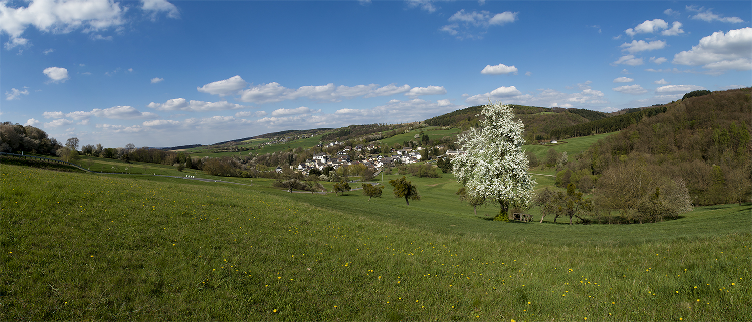 Niedertifenbach im Rhein-Lahn Kreis